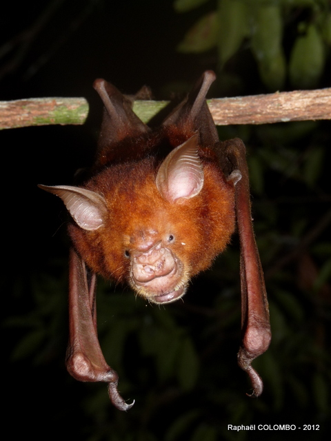 Photo prise au cours de l'expédition Sangha, lancée par Insectes du monde en 2012, en République Centrafricaine.